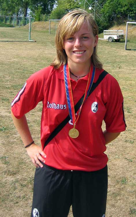 Die U-19-Europameisterin Juliane Maier am 31.07.2006